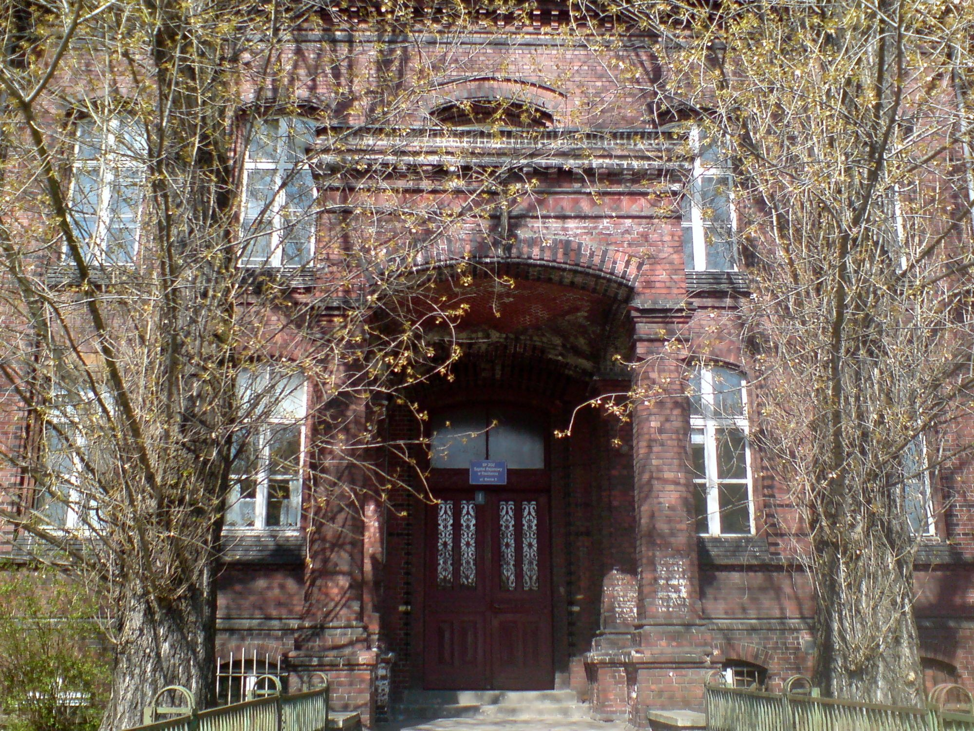 Dawny szpital miejski przy ulicy Bema w Raciborzu - wejście główne